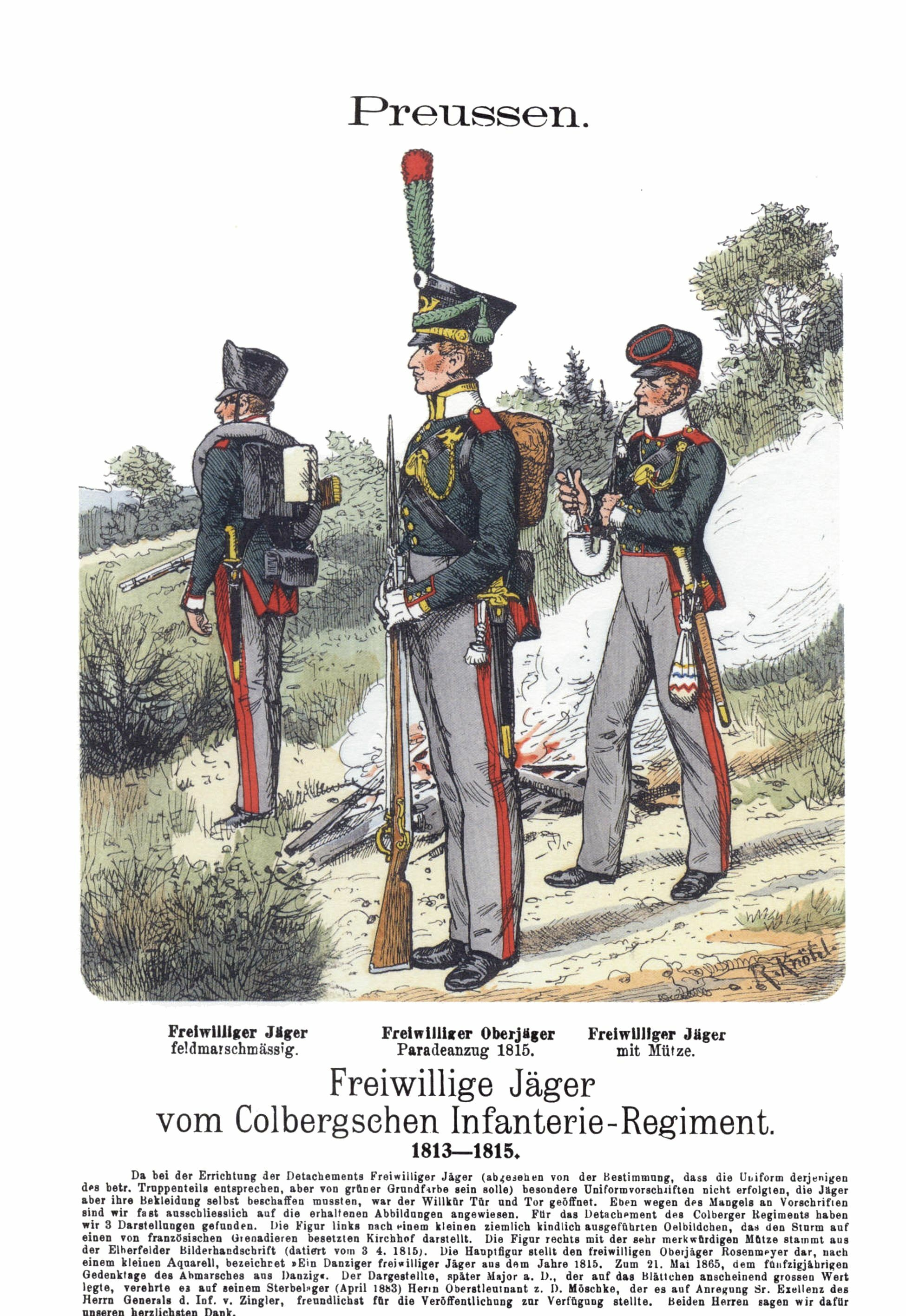 Иллюстрация Рихарда Кнотеля